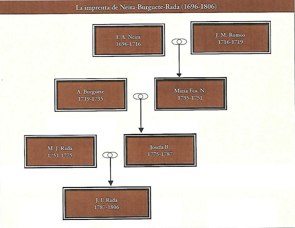 Impresores del taller Neira Juan Francisco Rada, Pamplona